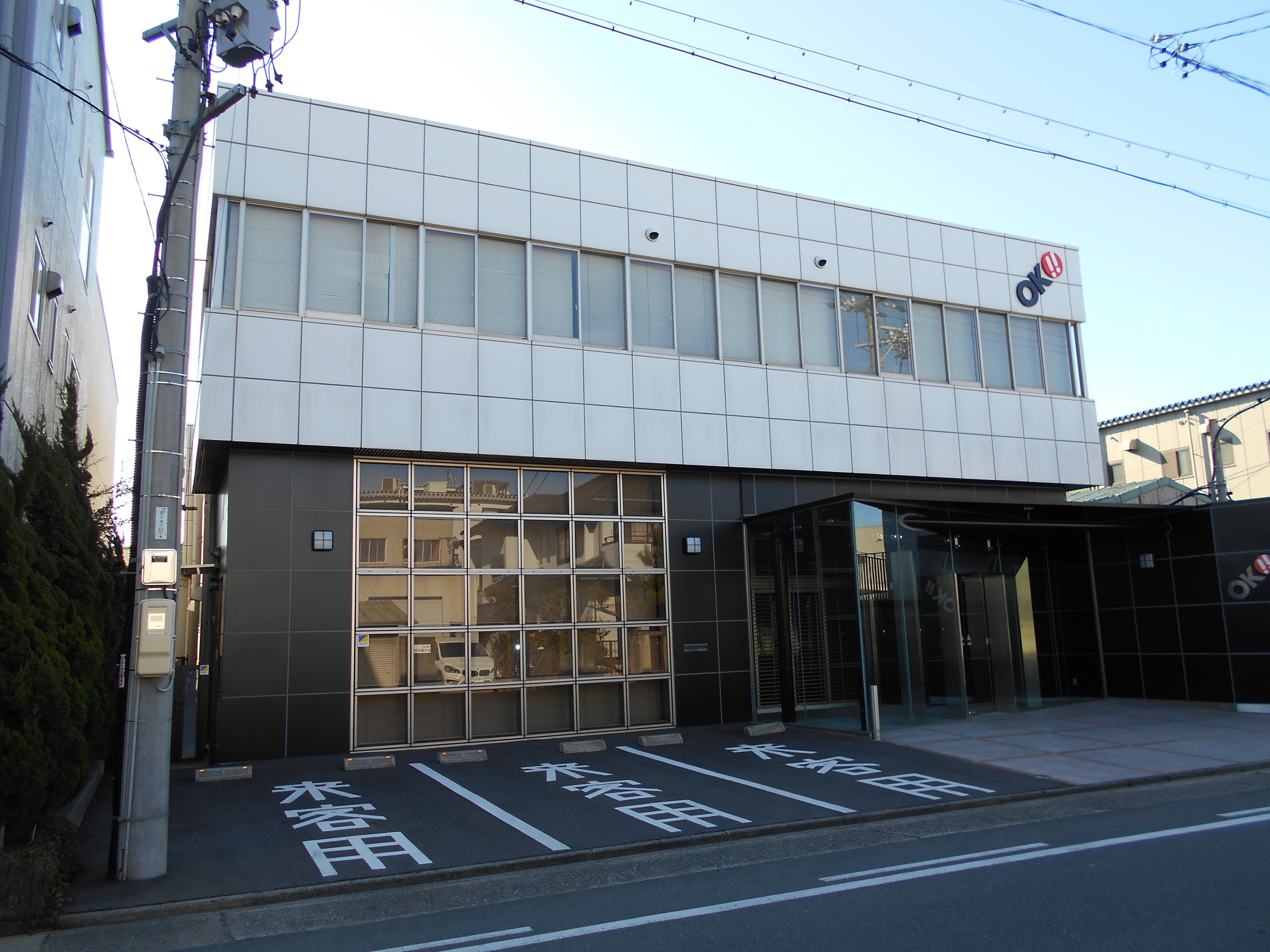 オッケー.本社（2016年2月）